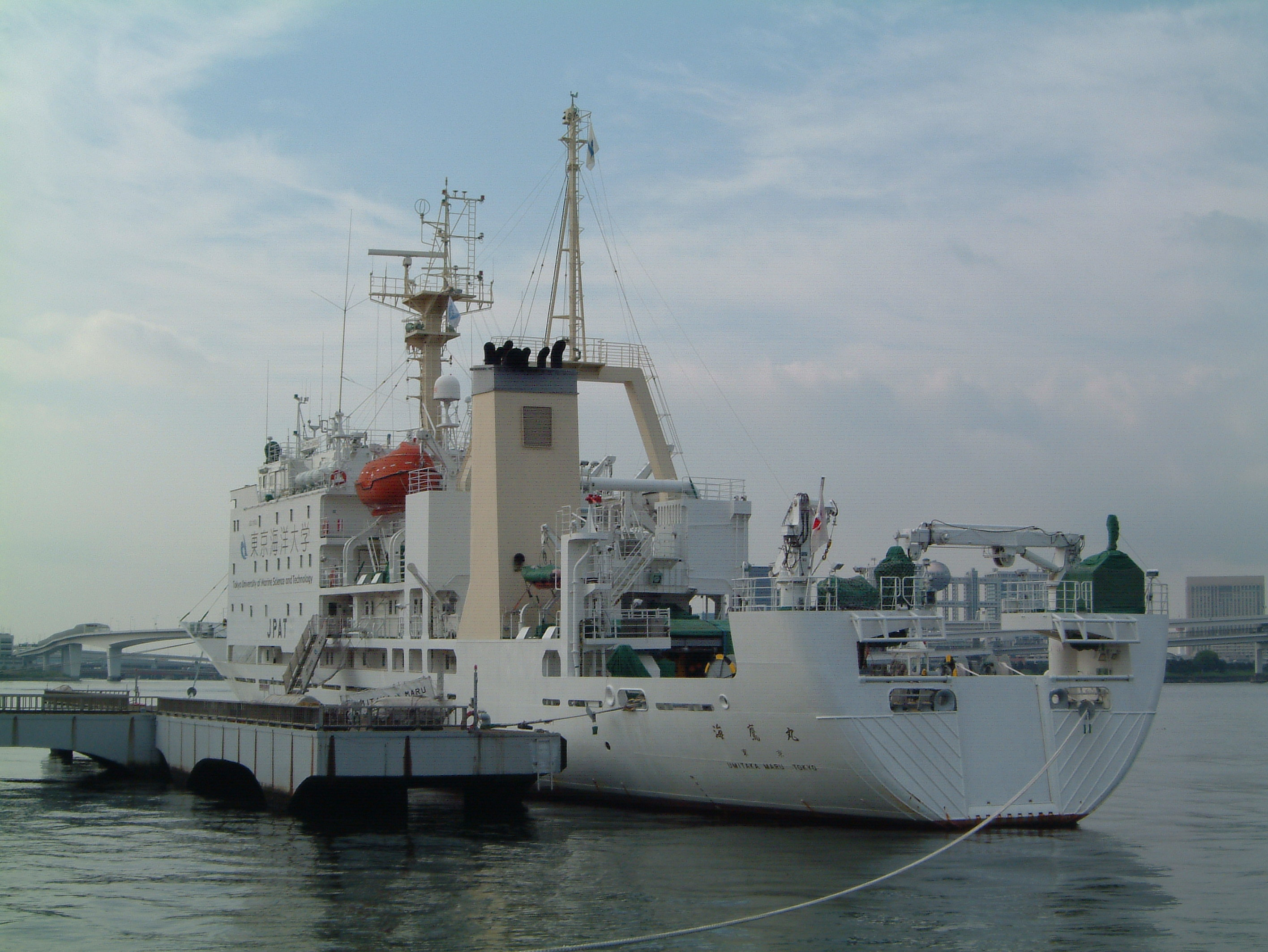 東京海洋大学海洋科学部の海洋調査船海鷹丸（うみたかまる）の後部、東京都の晴海ふ頭で撮影